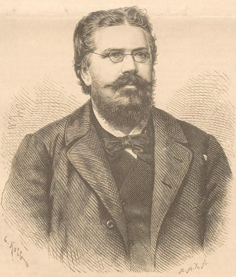 Robert von Bayer. In: Illustriertes Unterhaltungs-Blatt: wöchentliche Beilage zum Darmstädter Tagblatt. Darmstadt, 1890